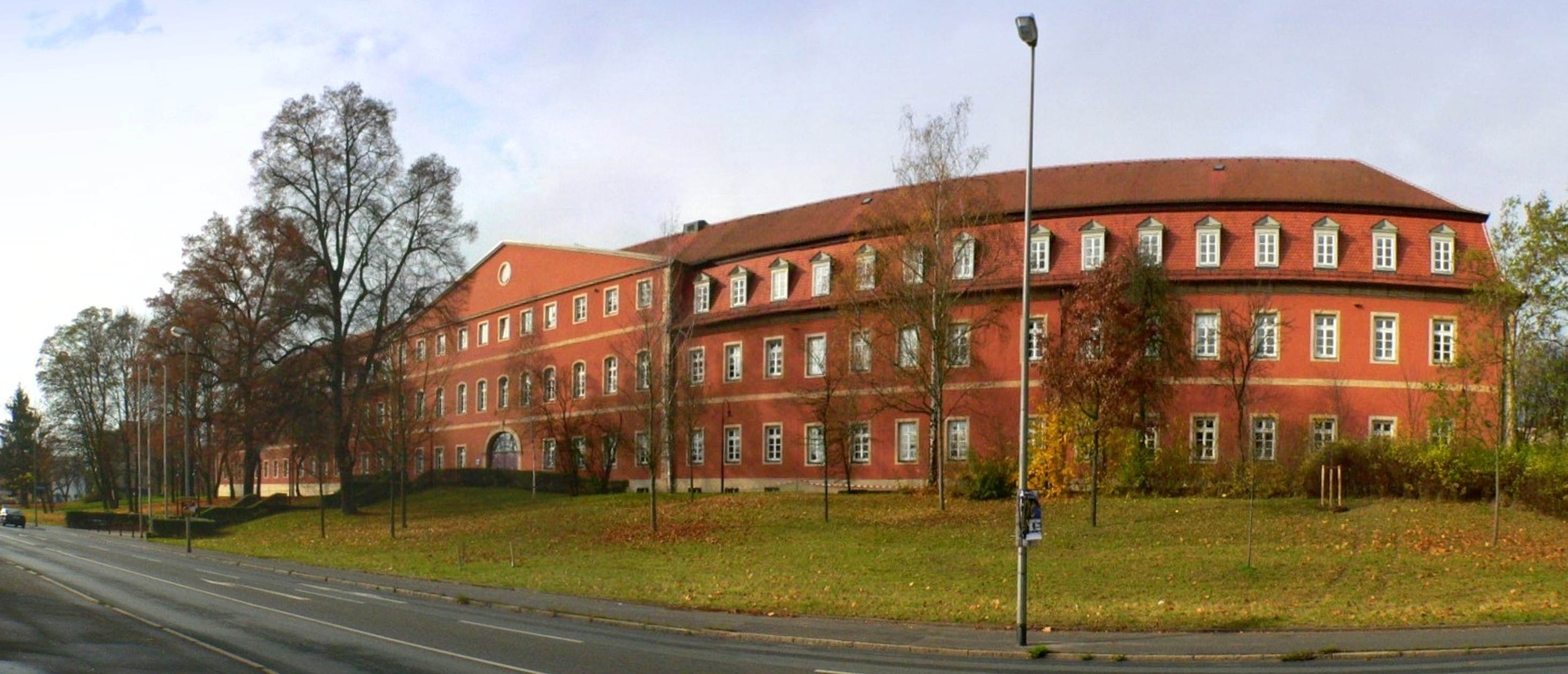 Coburg (Bayern), Neustadter Straße 1, ehem. Kaserne des III. Bataillons des 6. Thüringischen Infanterie-Regiments Nr. 95 (Siehe 95er-Kaserne), Objekt unter Denkmalschutz